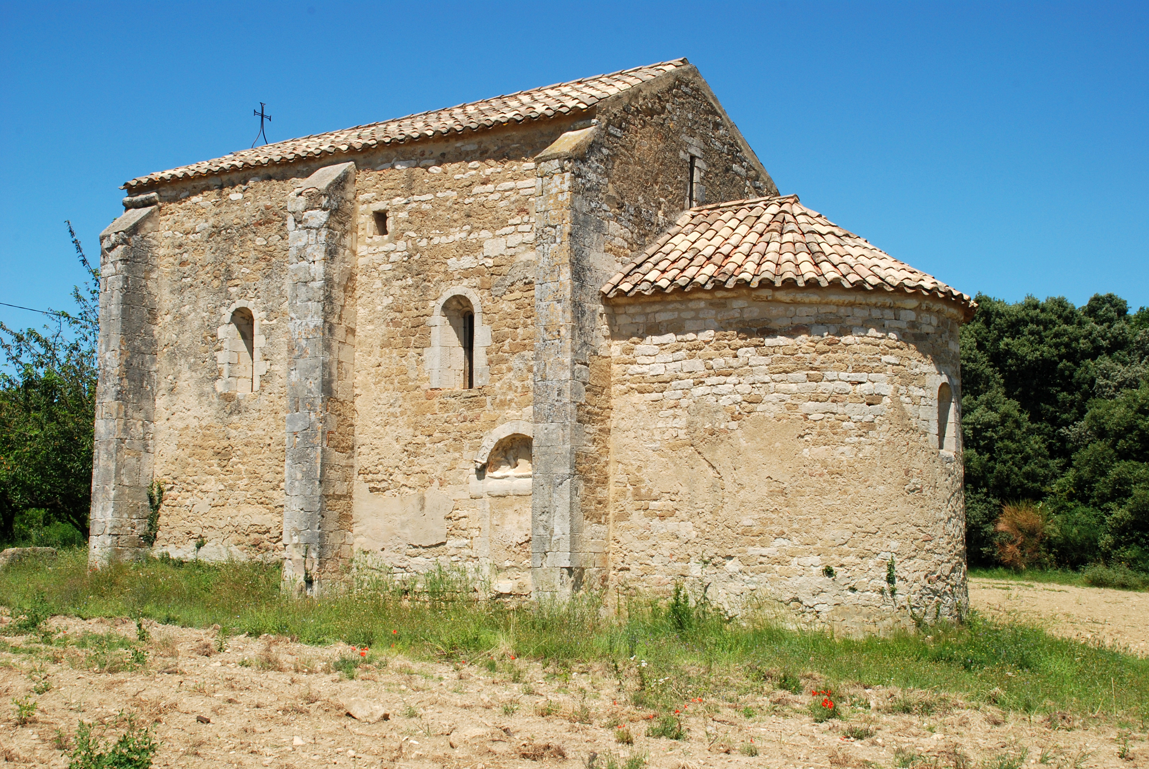 France - Drôme - Église Saint-Pierre-ès-Liens de Colonzelle